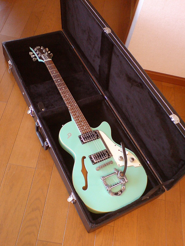 Duesenberg Guitar